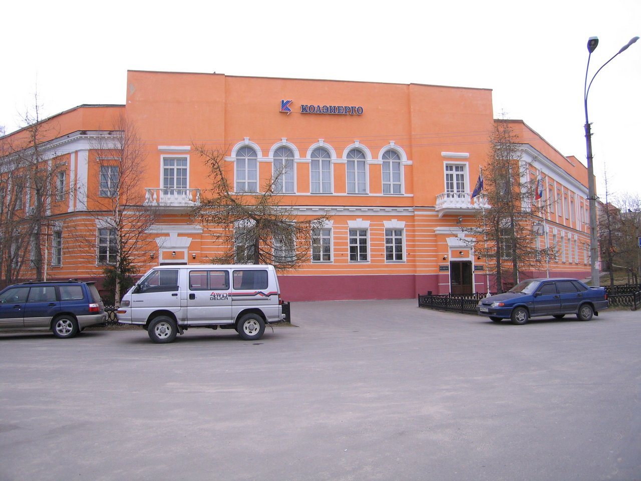 Здание Колэнерго — региональной энергетической компанияи, расположенной в городе Мурманск, Россия